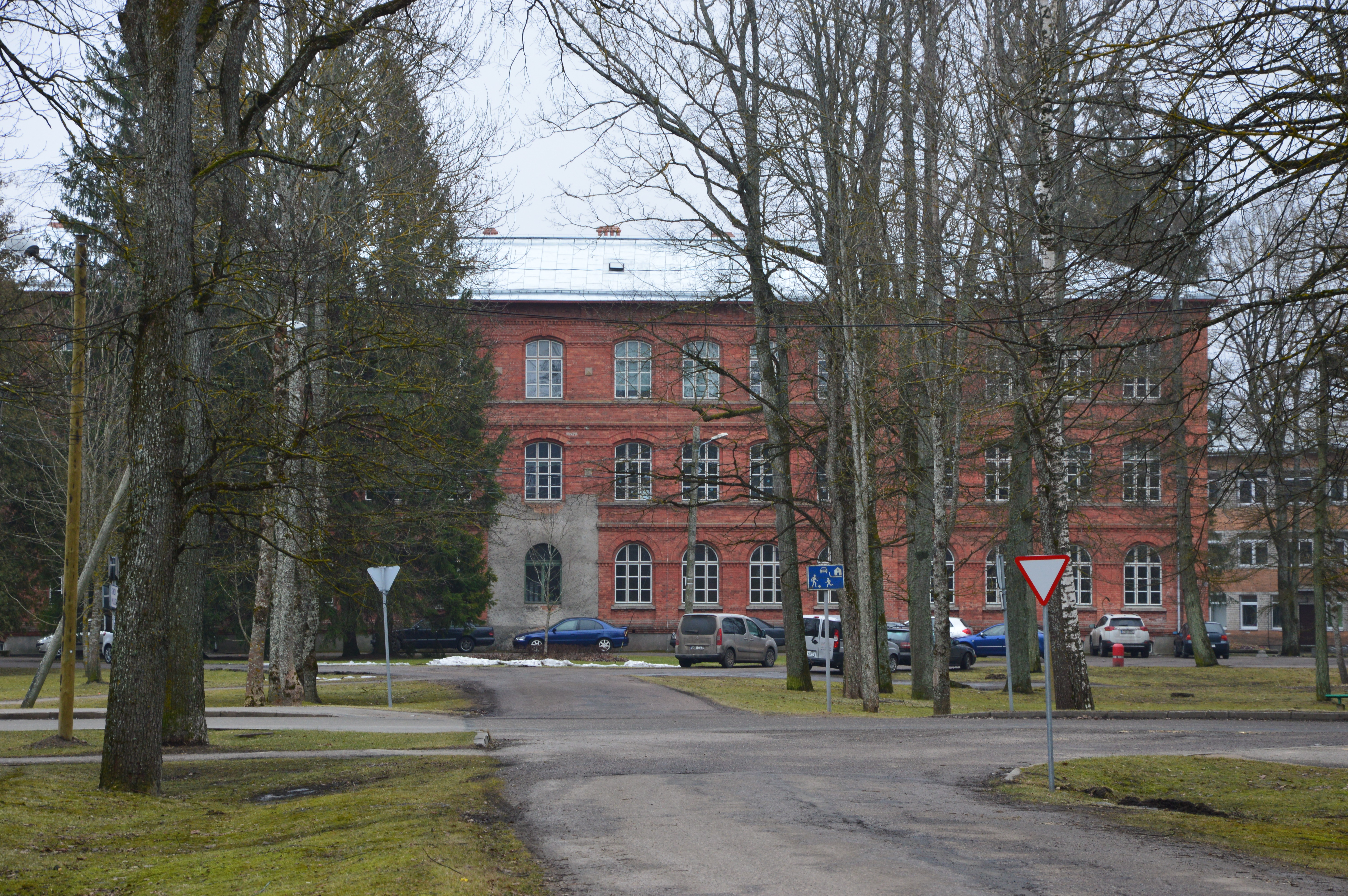 Kool-kiriku hoone Sindis Kooli tänav 9.